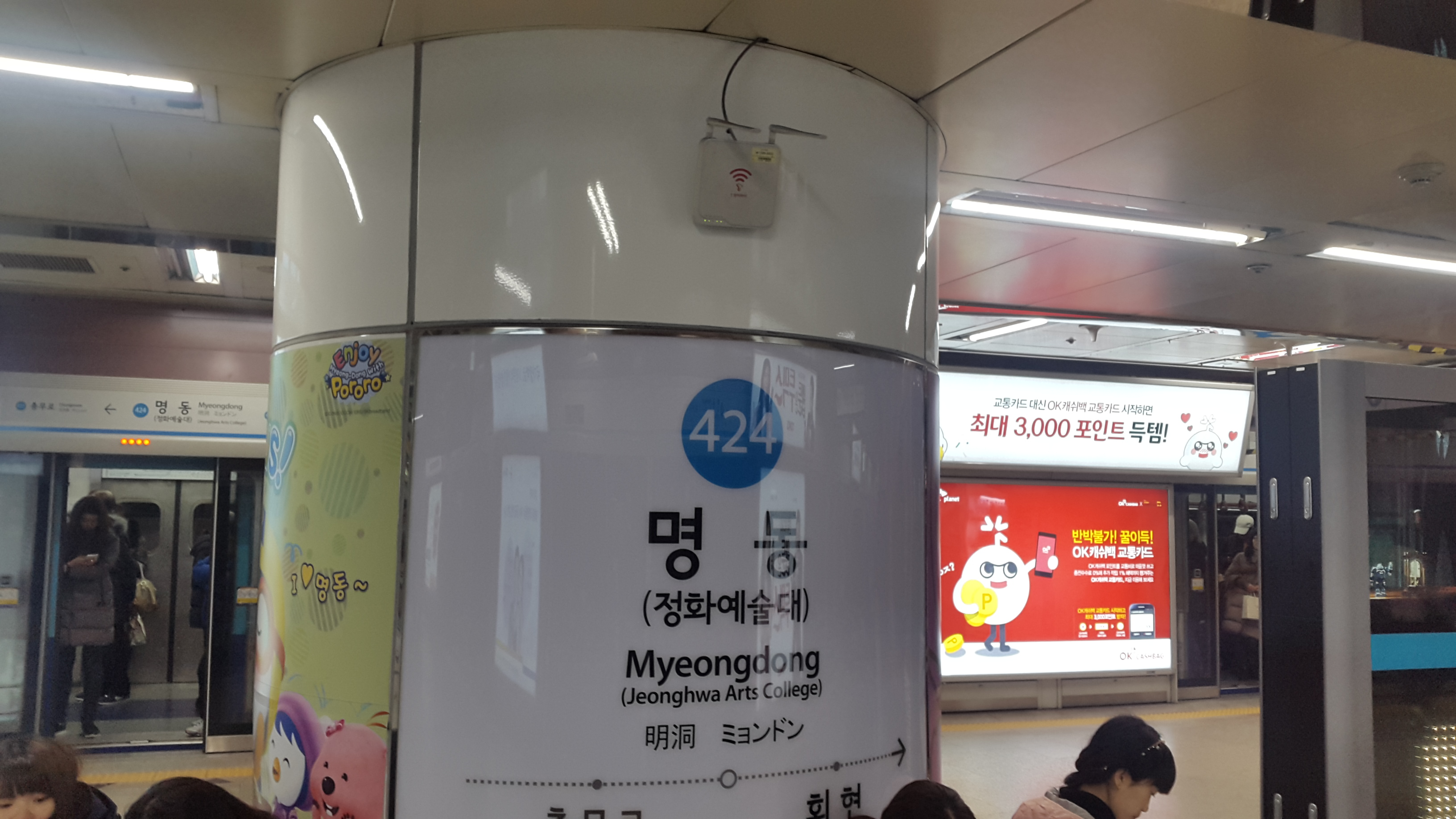 명동역 서울남산체 1